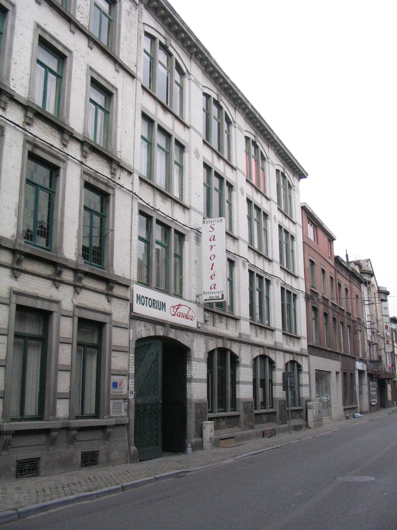 Façade motorium Saroléa à Herstal